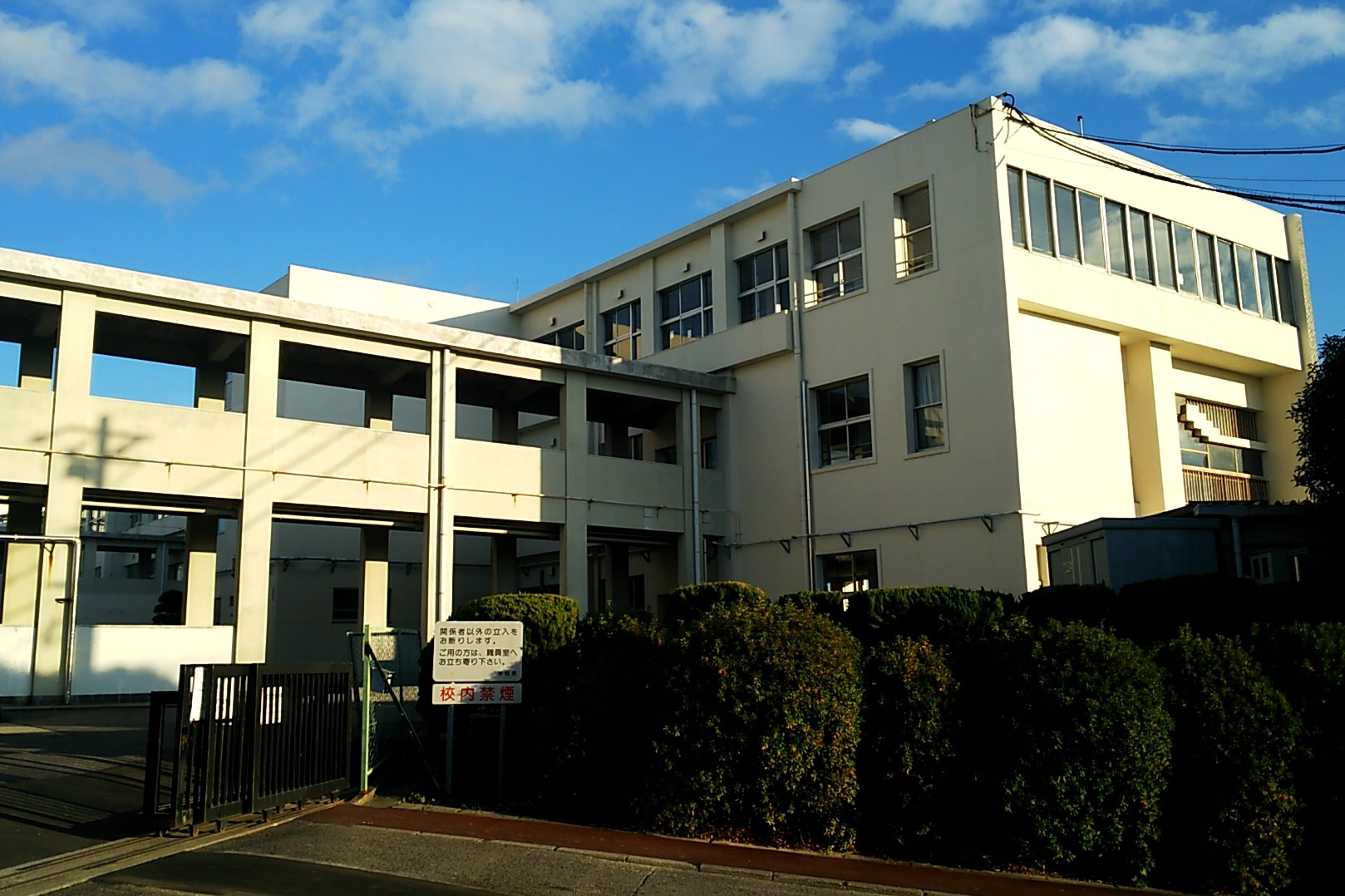 愛知県豊明市の豊明市立豊明中学校。